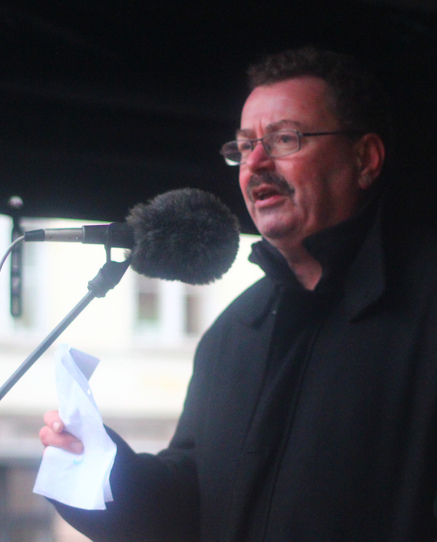 Per Clausens tale for enhedslisten til klima og miljø bevægelsernes demonstration under de globale klima forhandlinger til cop17 i Sydafrika december 2011. Han insistere på at vi kræver at vores pensions penge bliver brugt til at gennemføre klimatiltag der gør os uafhængige af fossile brandstoffer, så de unge får mulighed for at agere i fremtiden uden at forurene.